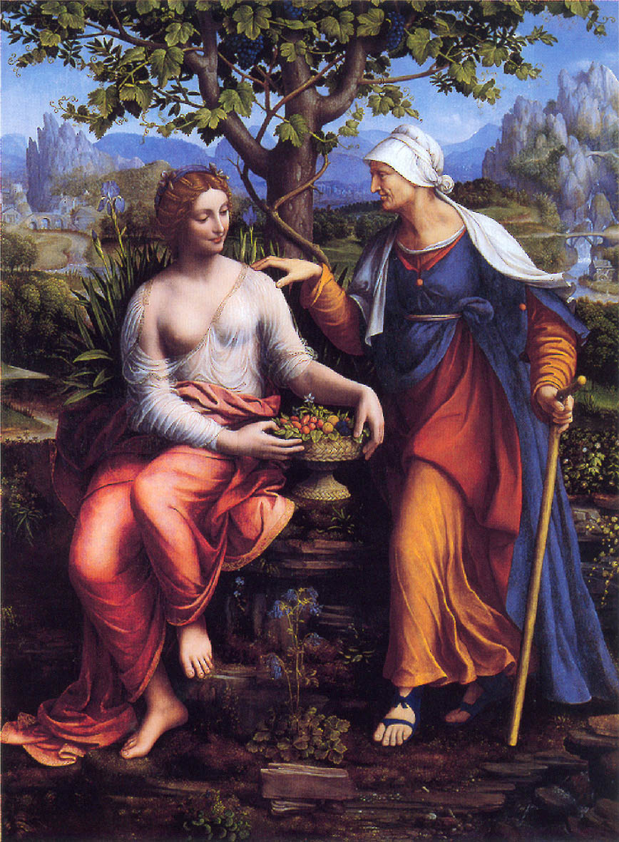 Pour ce tableau, les historiens de l'art estiment qu'il s'est inspiré d'un carton de Léonard de Vinci pour représenter la déesse Pomone